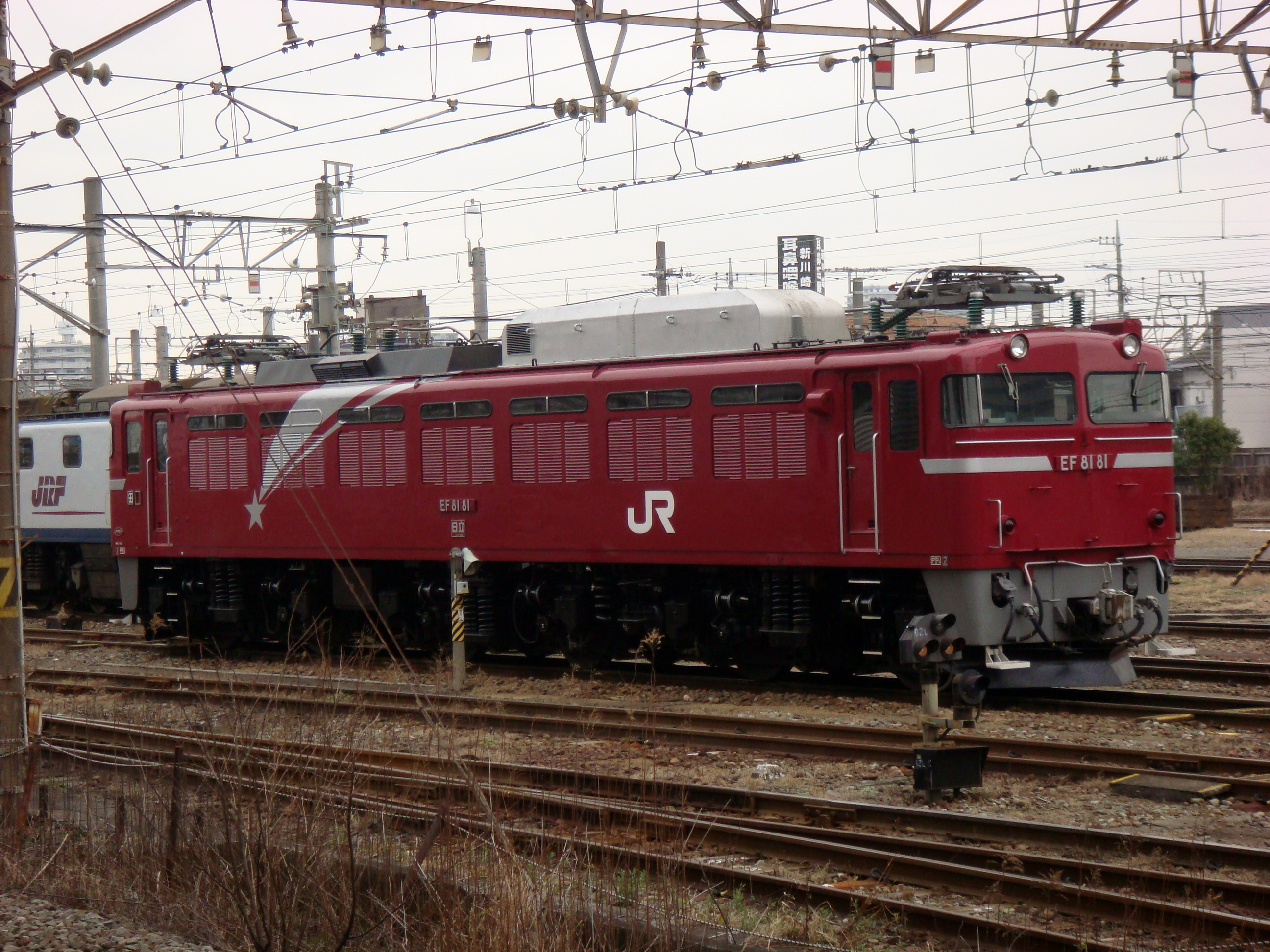 JR東日本 田端運転所に所属するEF81 81電気機関車 新鶴見機関区にて投稿者撮影